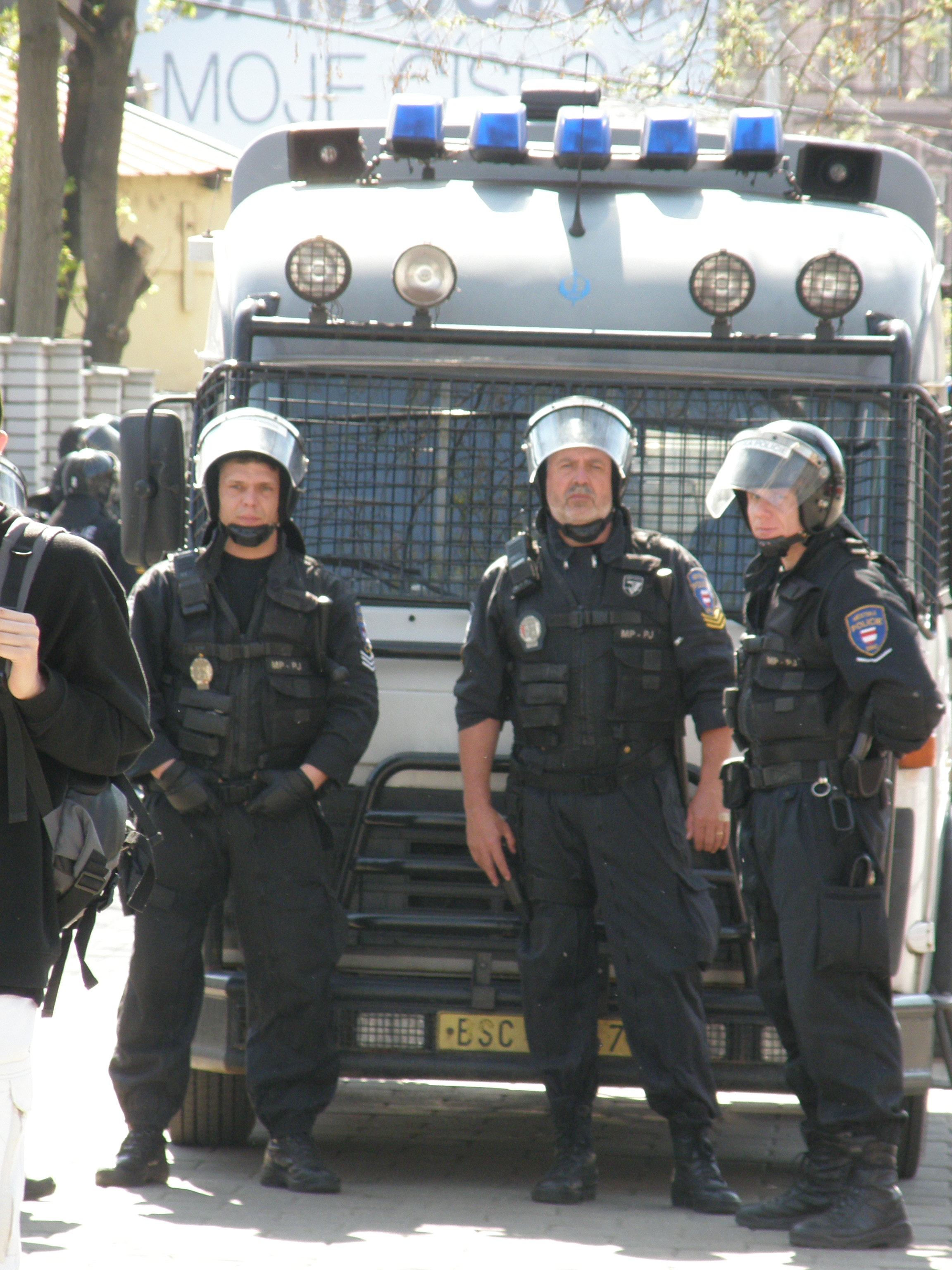 Czech police (Brno)